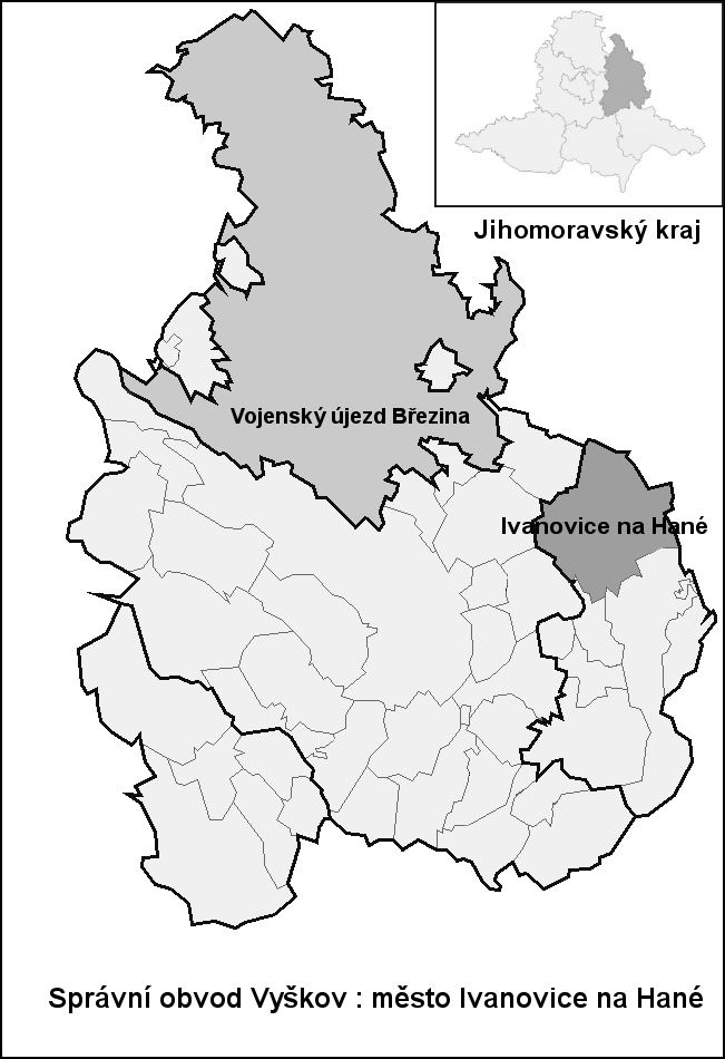 Hranice Ivanovice_na_Hané (Vyškov- czech republic)